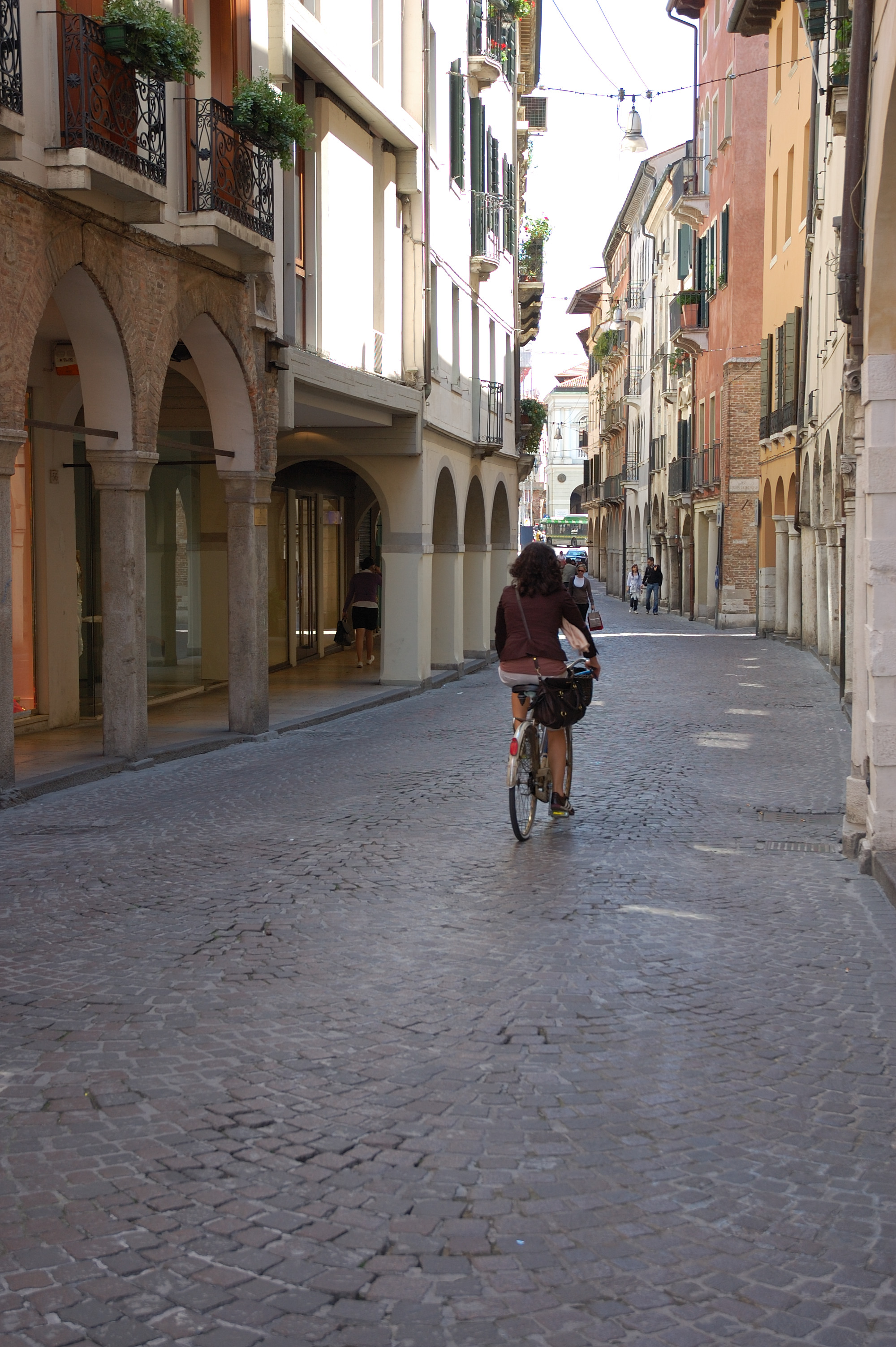 Inizio del Calmaggiore a Treviso.